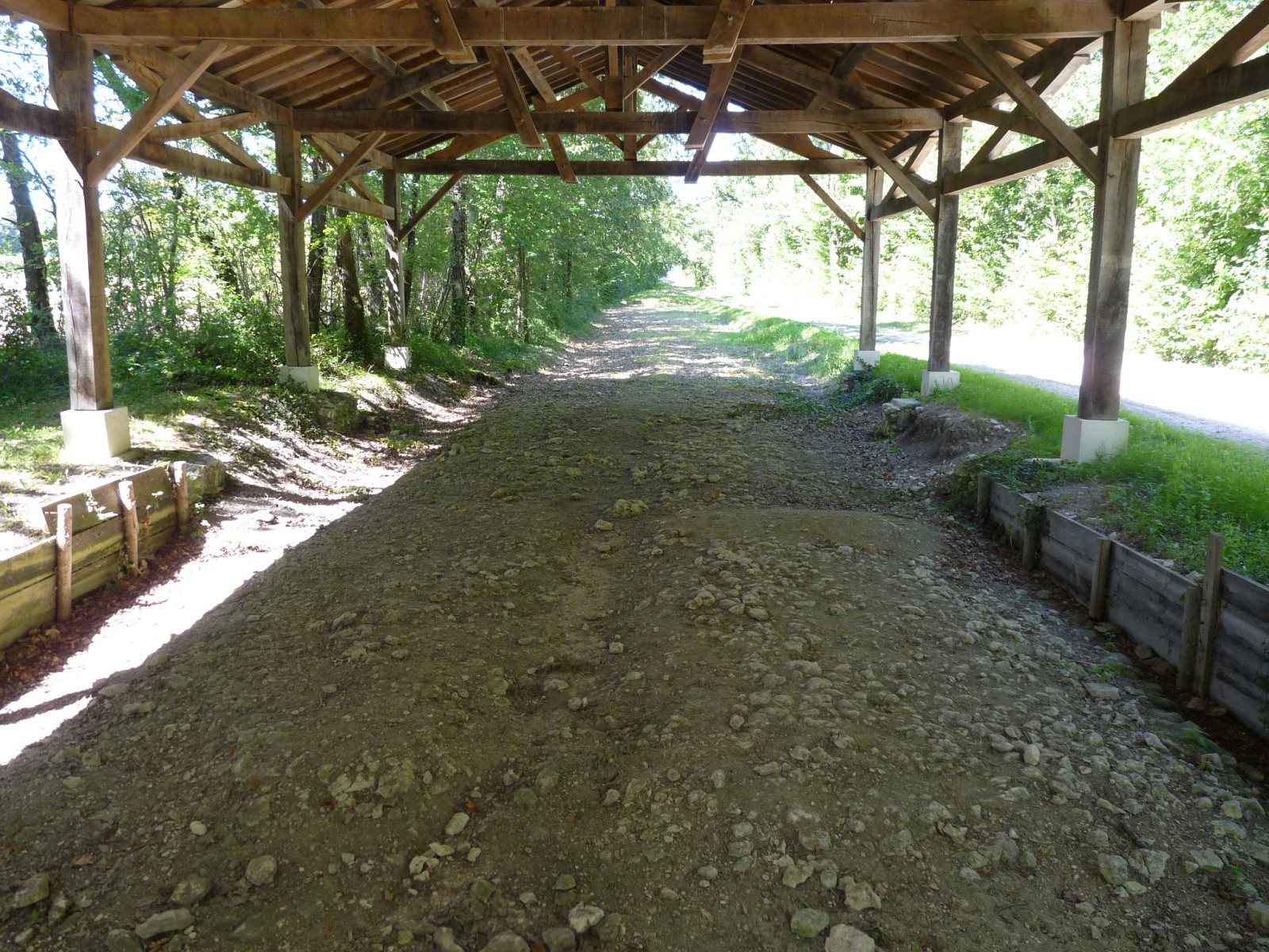 Ancienne voie romaine Saintes-Pons-Périgueux, limite Neulles-Neuillac, Charente-Maritime, France